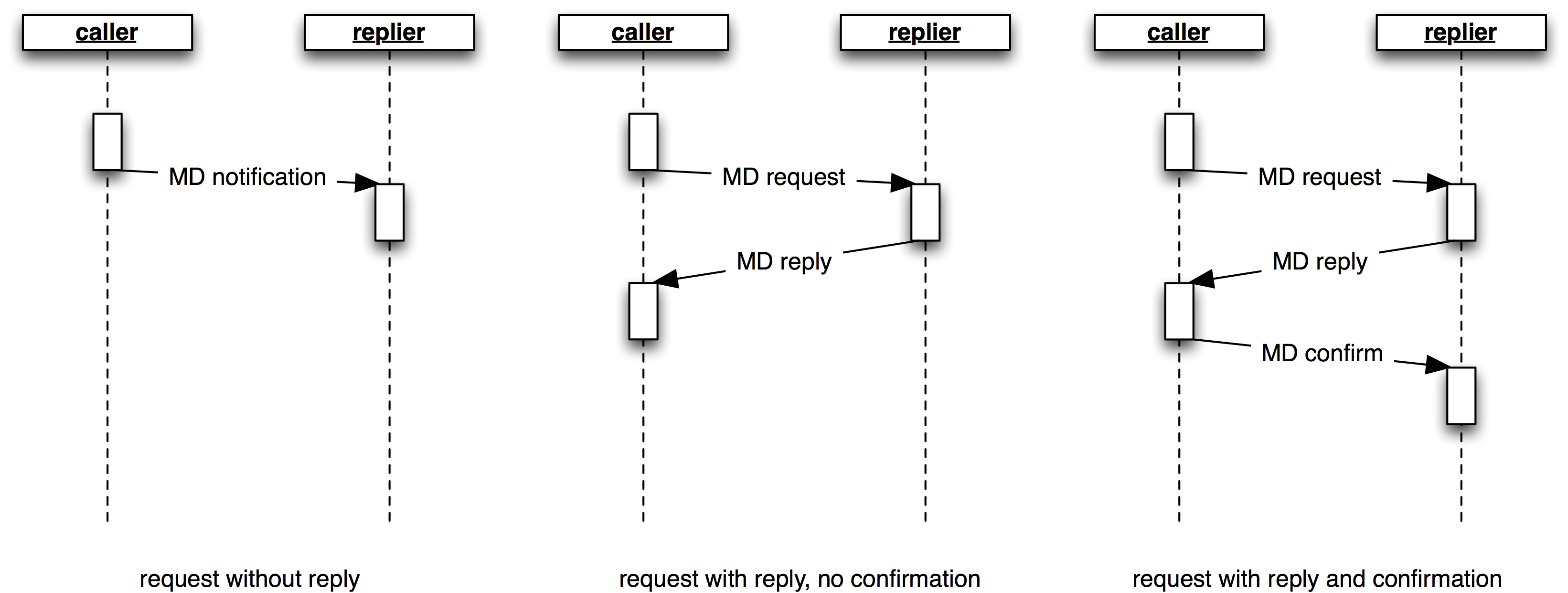 Message Data communication pattern